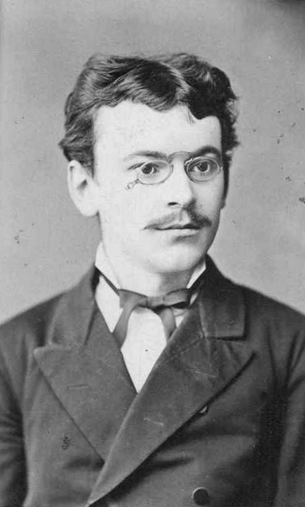 Георги Дерманчев (1857-1927)